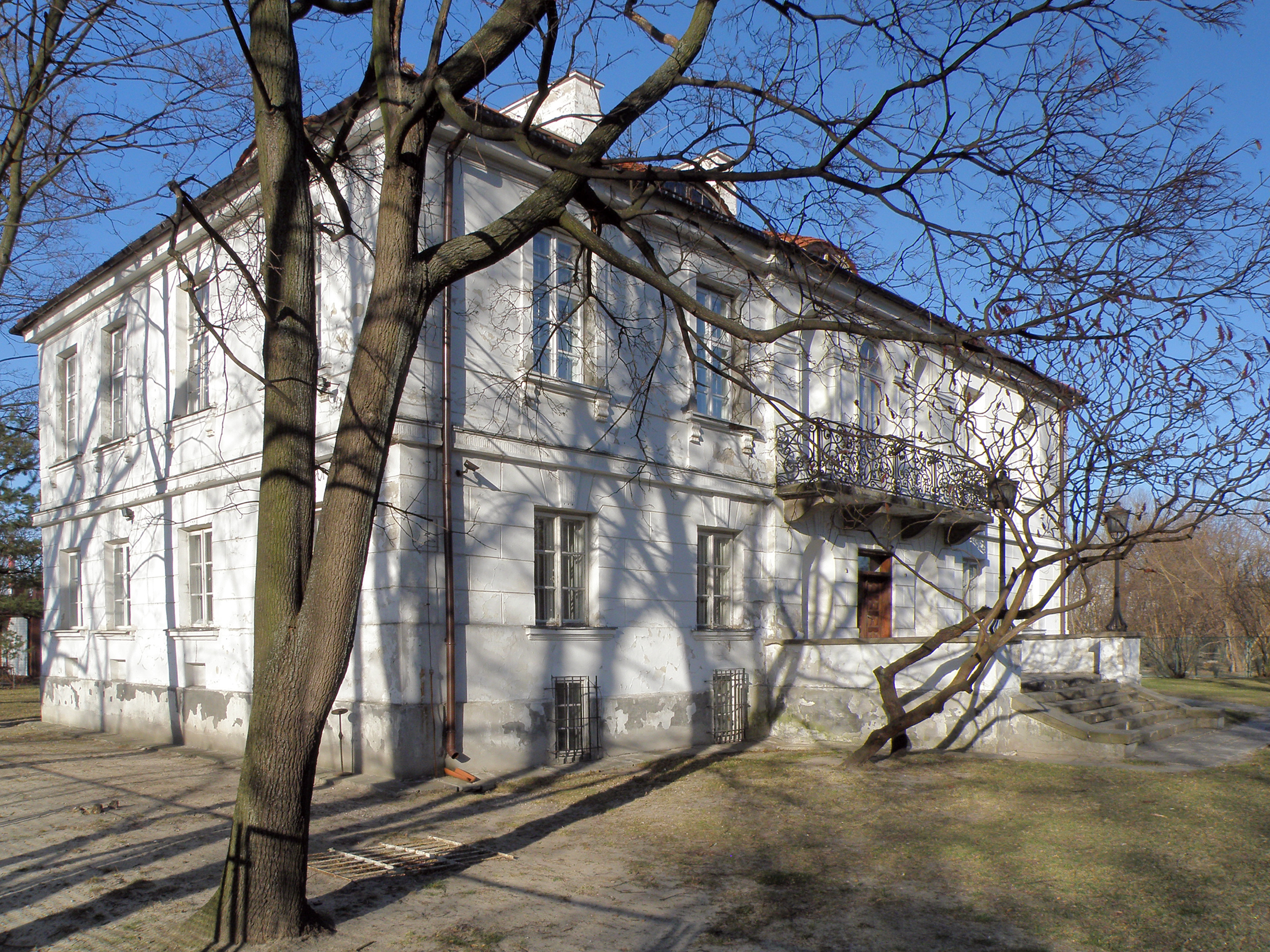 Dwór księcia Michała Poniatowskiego (Dworek Grochowski), Warszawa, Praga Południe